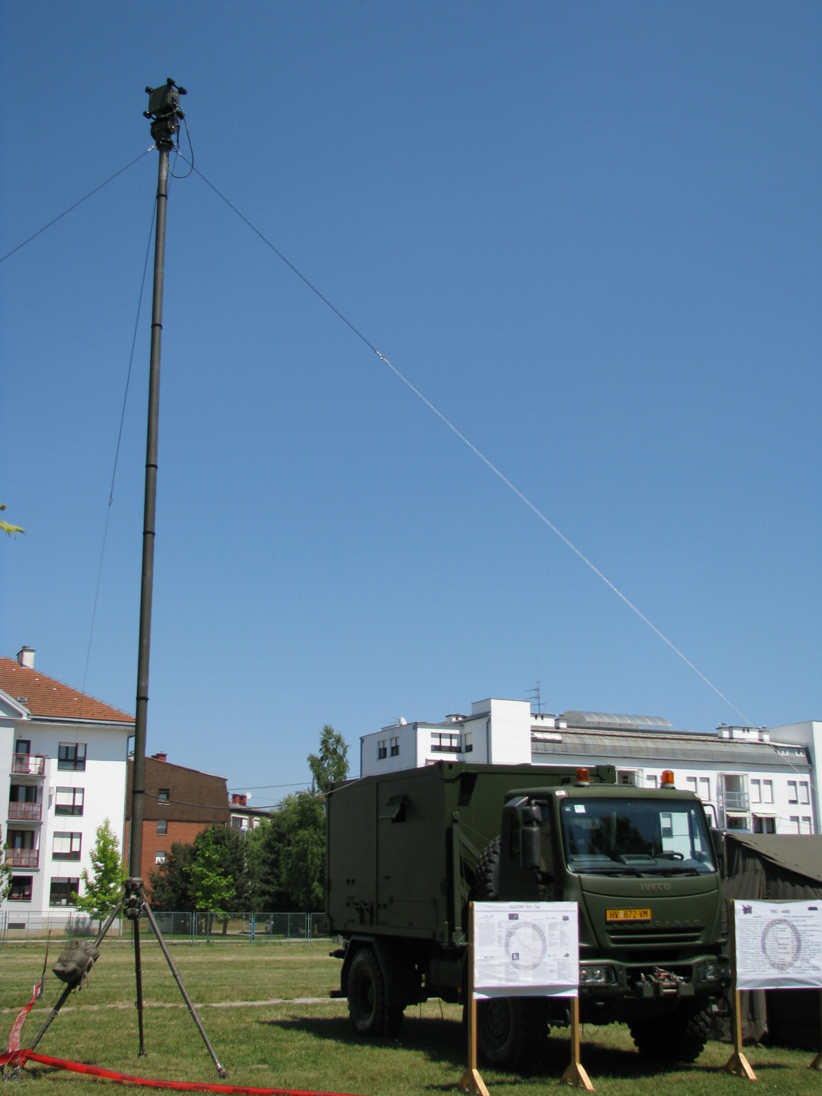 Sustav Eri-Tac Pukovnje veze HKoV